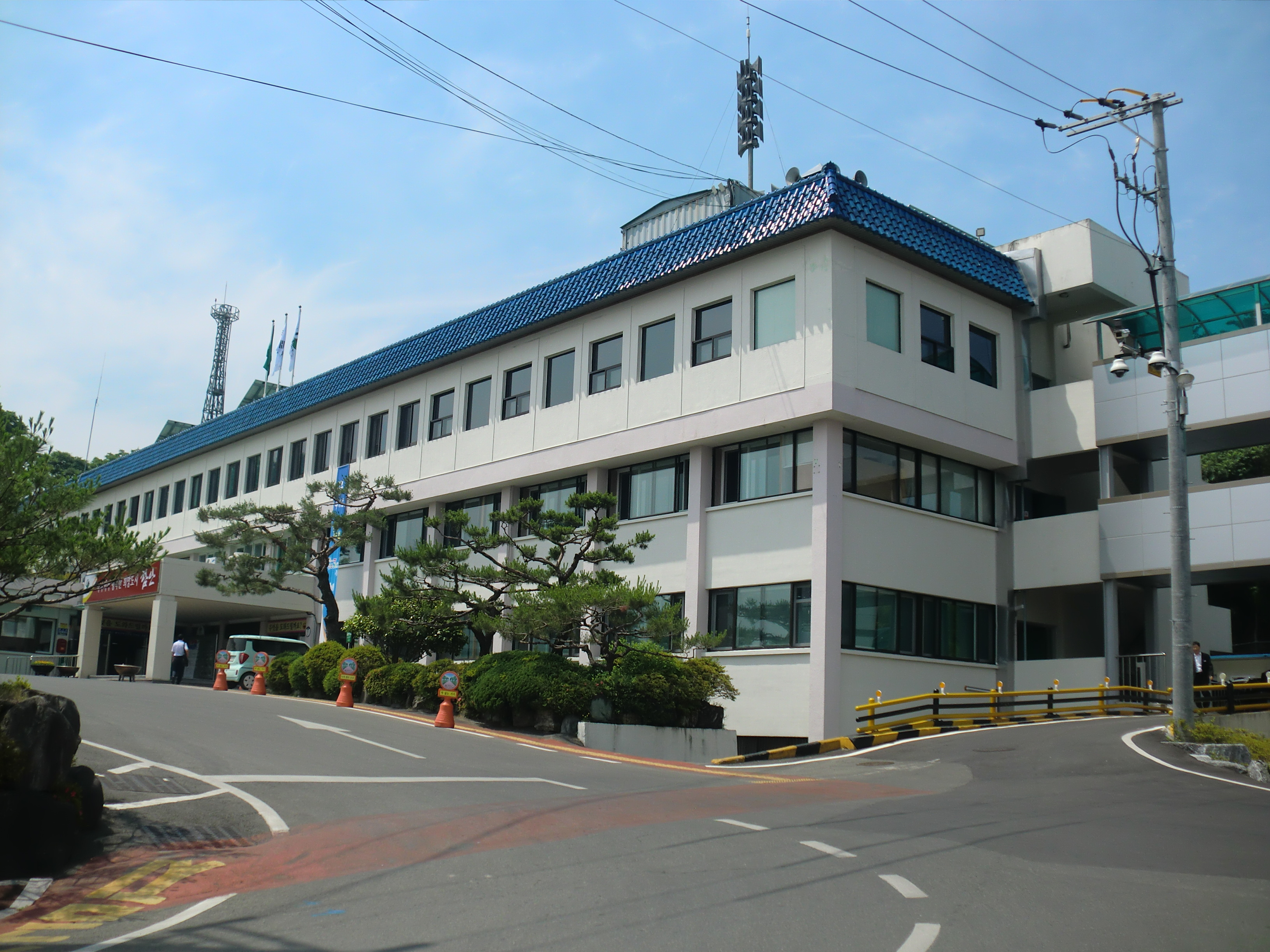 경상남도 함안군에 있는 함안군청